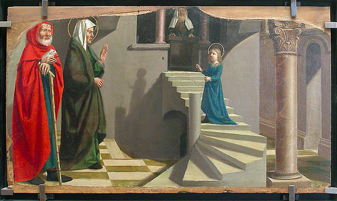 Dipinti francesi nel Louvre, Parigi, secc. XIV-XV